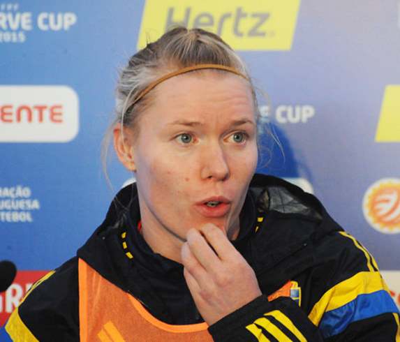 a_135_6188